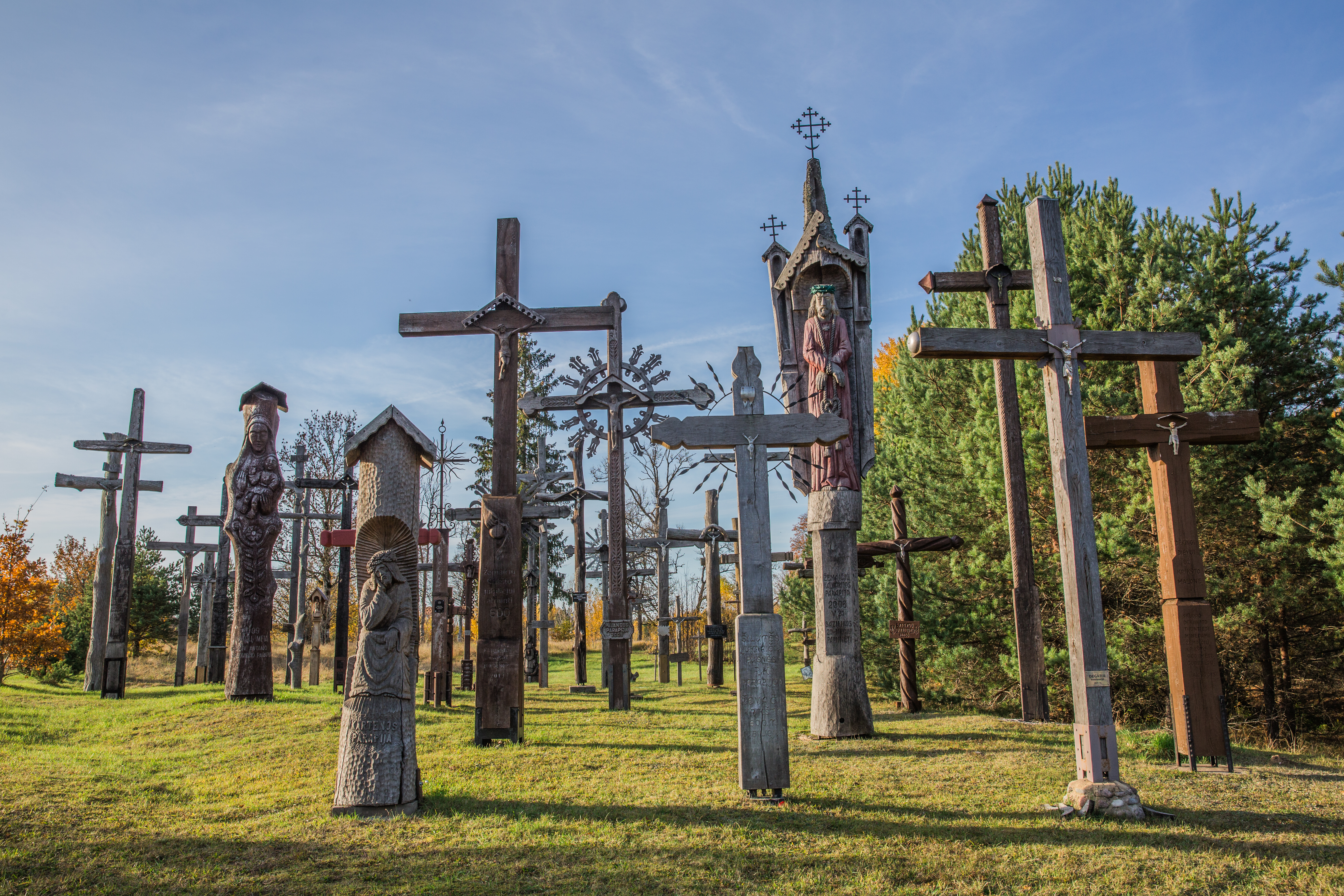 Kęstaičių kankinių vieta